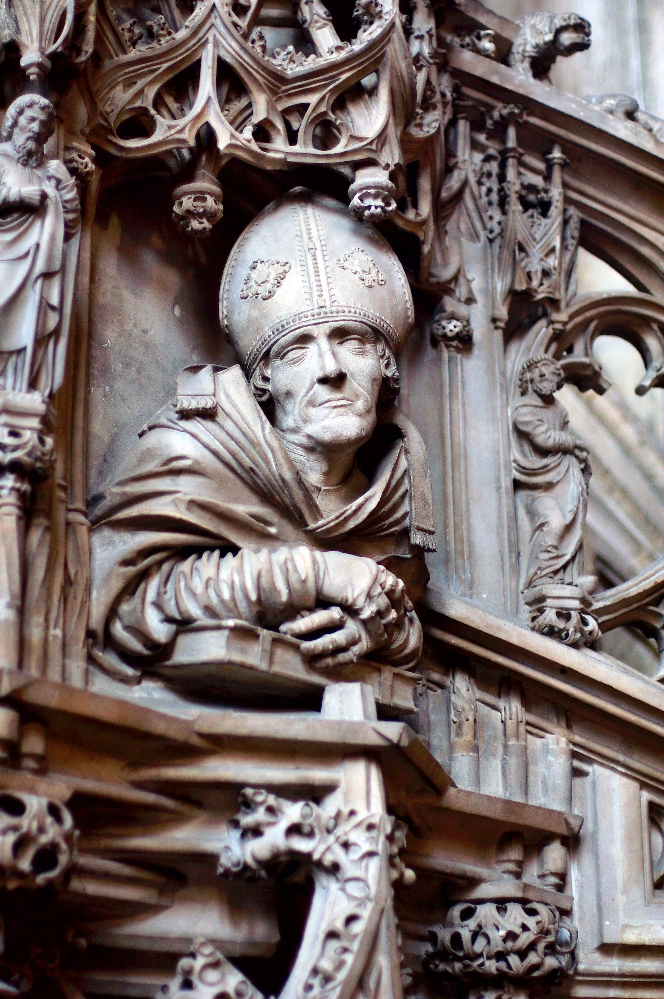 Detail einer der Figuren an der Domkanzel im Wiener Stephansdom (hl. Ambrosius).